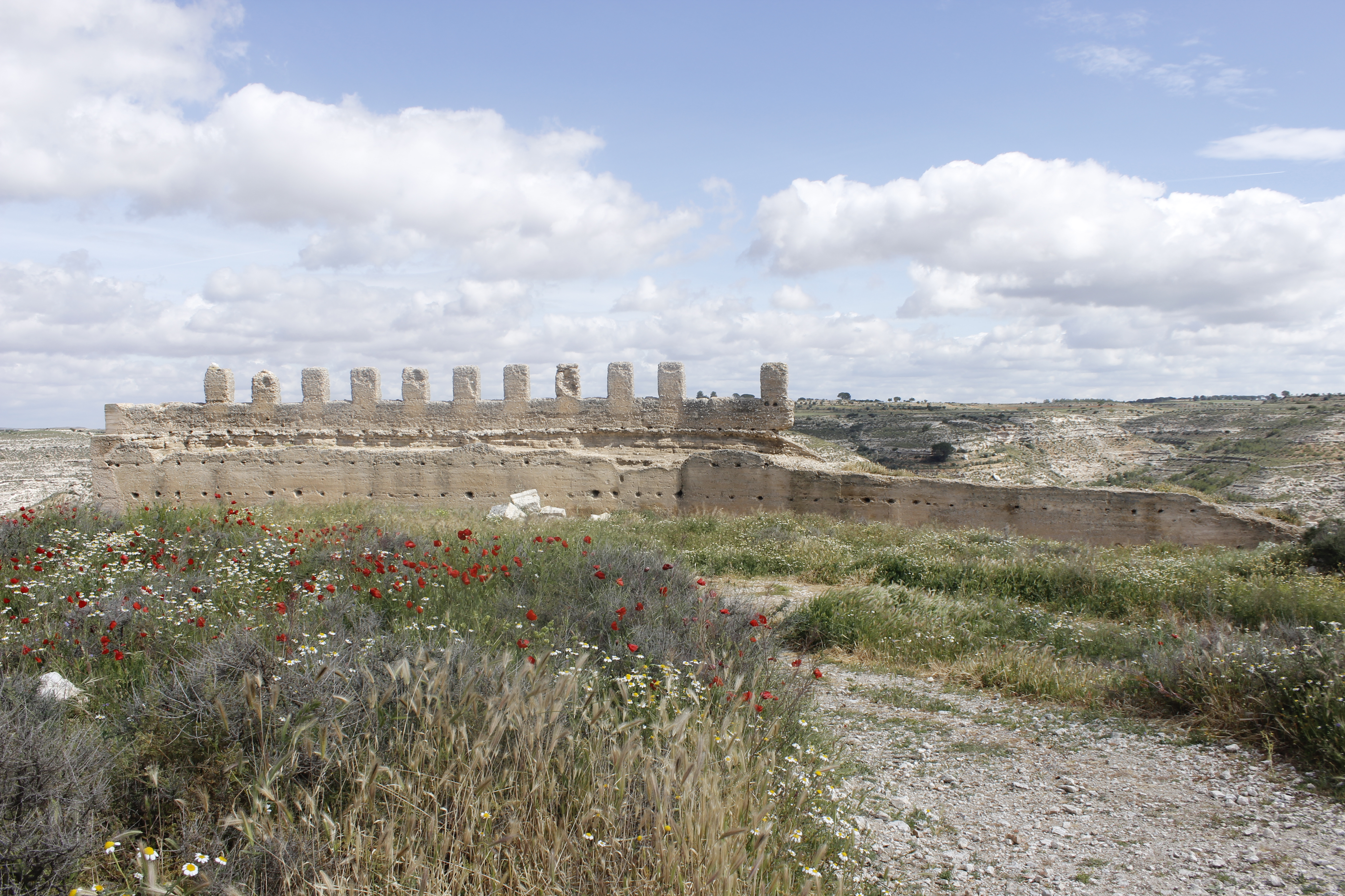 Pendiente